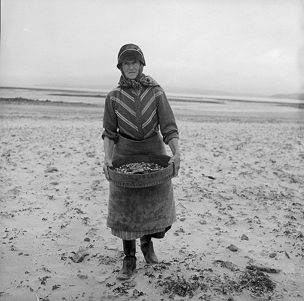 Teitl Cymraeg/Welsh title: Mrs Lettice Rees yn hel cocos ar draeth Cefn Sidan, Pen-bre Cyfrwng/Medium: Negydd ffilm / Film negative Cyfeiriad/Reference: (gch28144) Rhif cofnod / Record no.: 3471324 Rhagor o wybodaeth am gasgliad Geoff Charles yn Llyfrgell Genedlaethol Cymru More information about the Geoff Charles Collection at the National Library of Wales